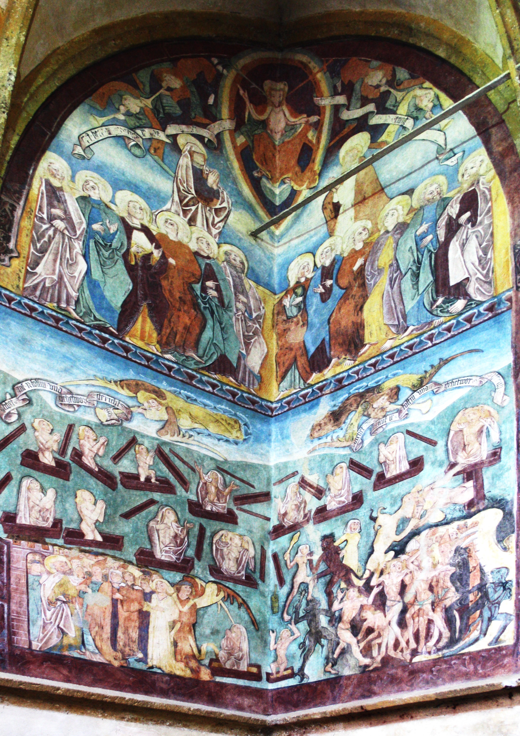 Nikolauskirche in Bad Gastein, Gasteinertal. Erbaut 1389 Fresco